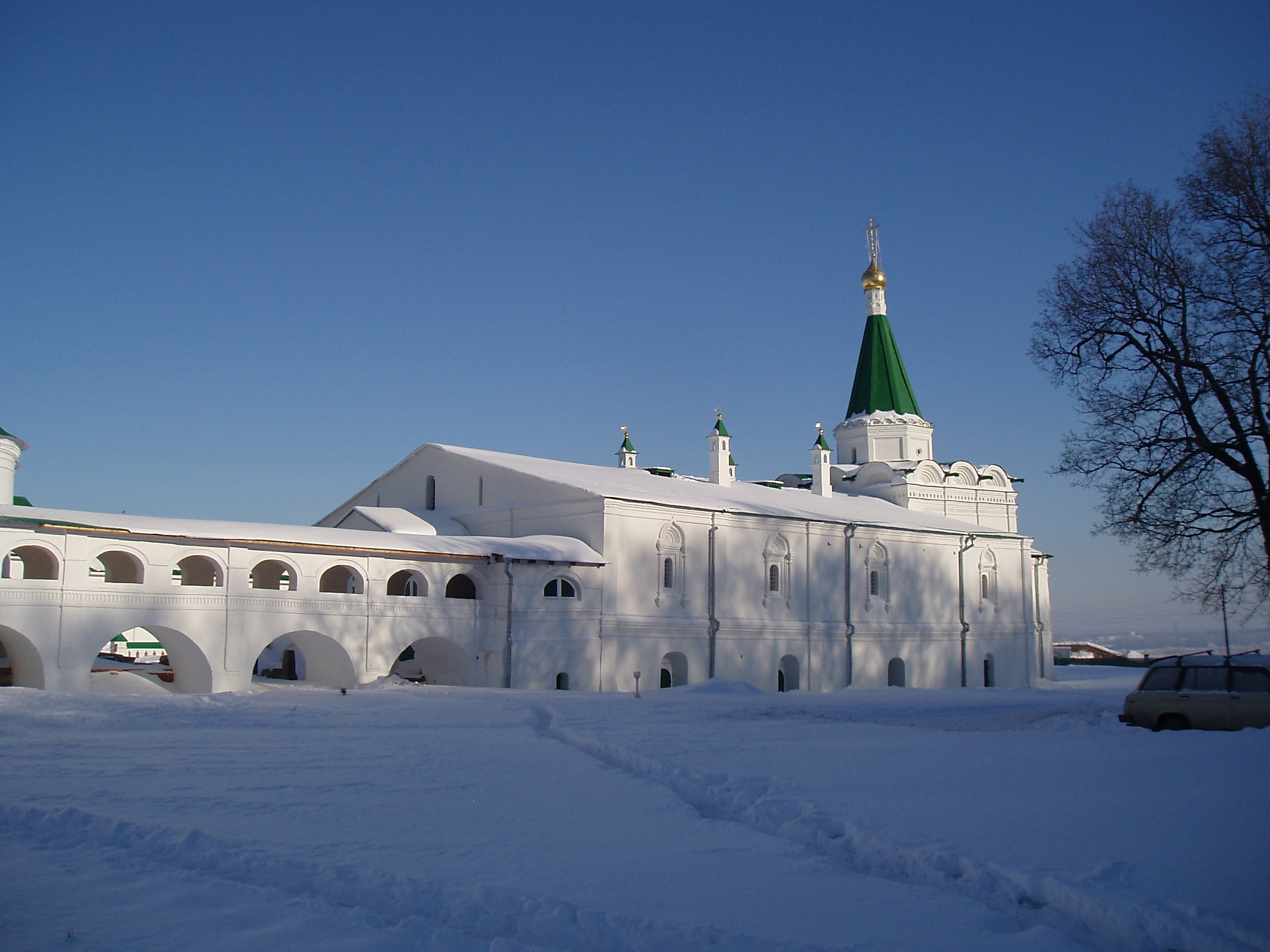 Успенская церковь. Печерский Вознесенский монастырь